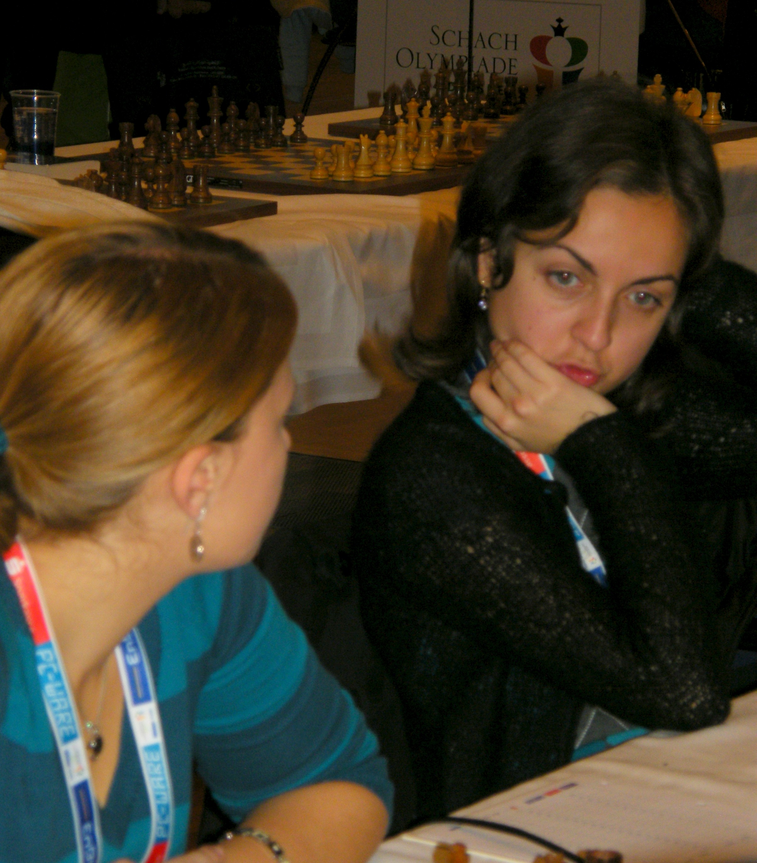 Josefina Paulet und Alina Motoc bei der 38. Schacholympiade in Dresden 2008